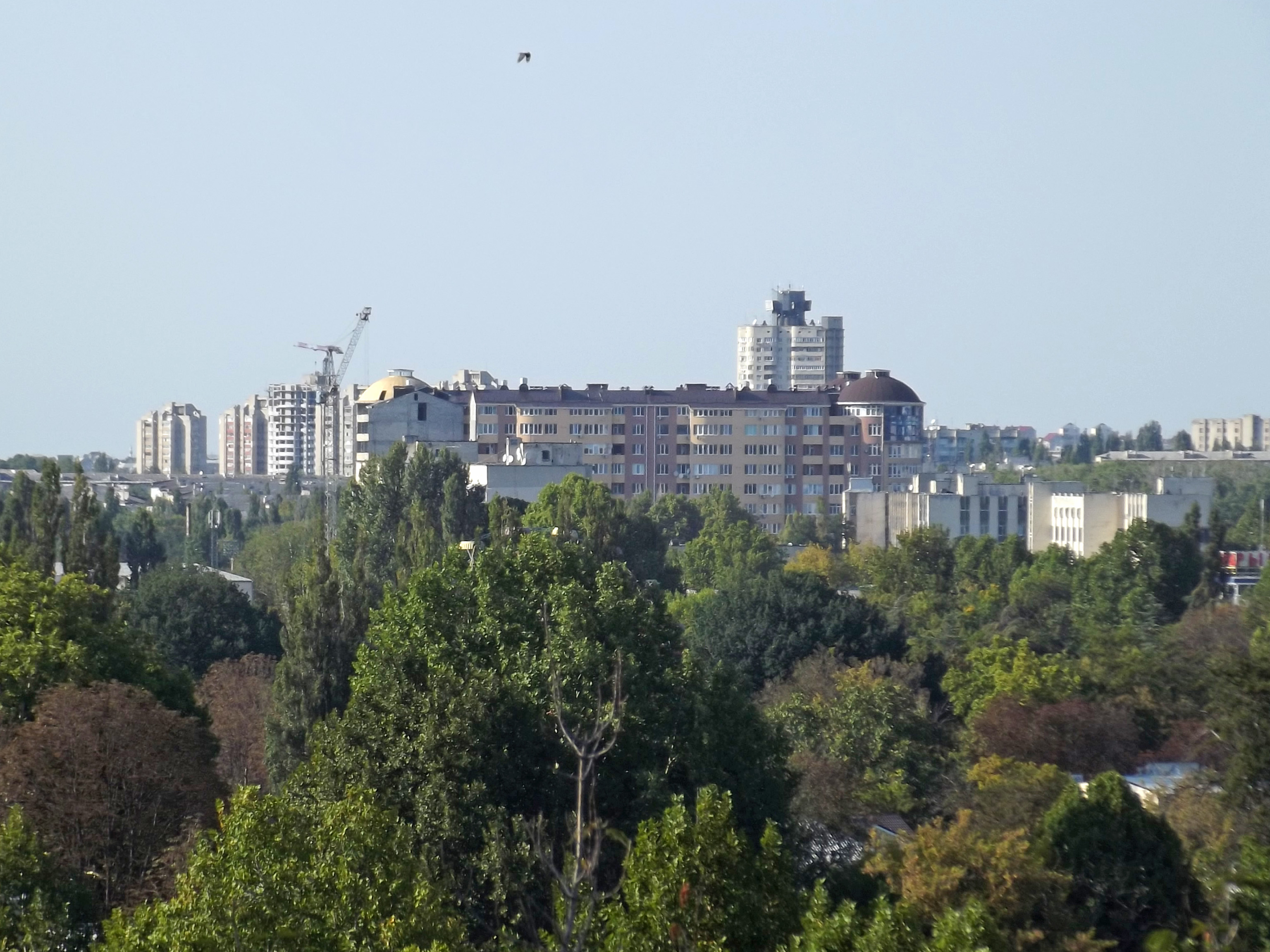 Вид на новые районы